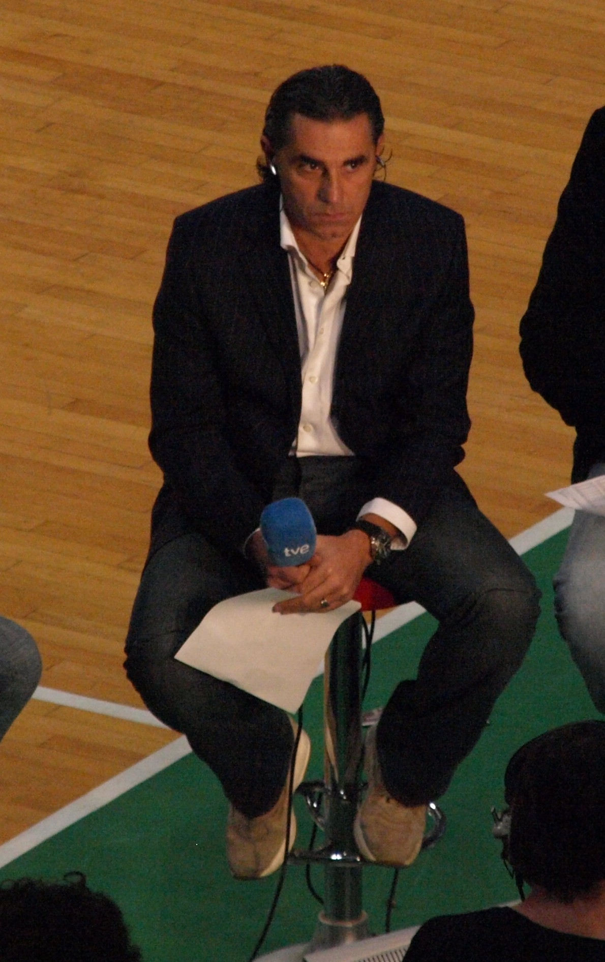 Sergio Scariolo en su faceta de comentarista de televisión en el Olímpico de Badalona en Noviembre de 2008